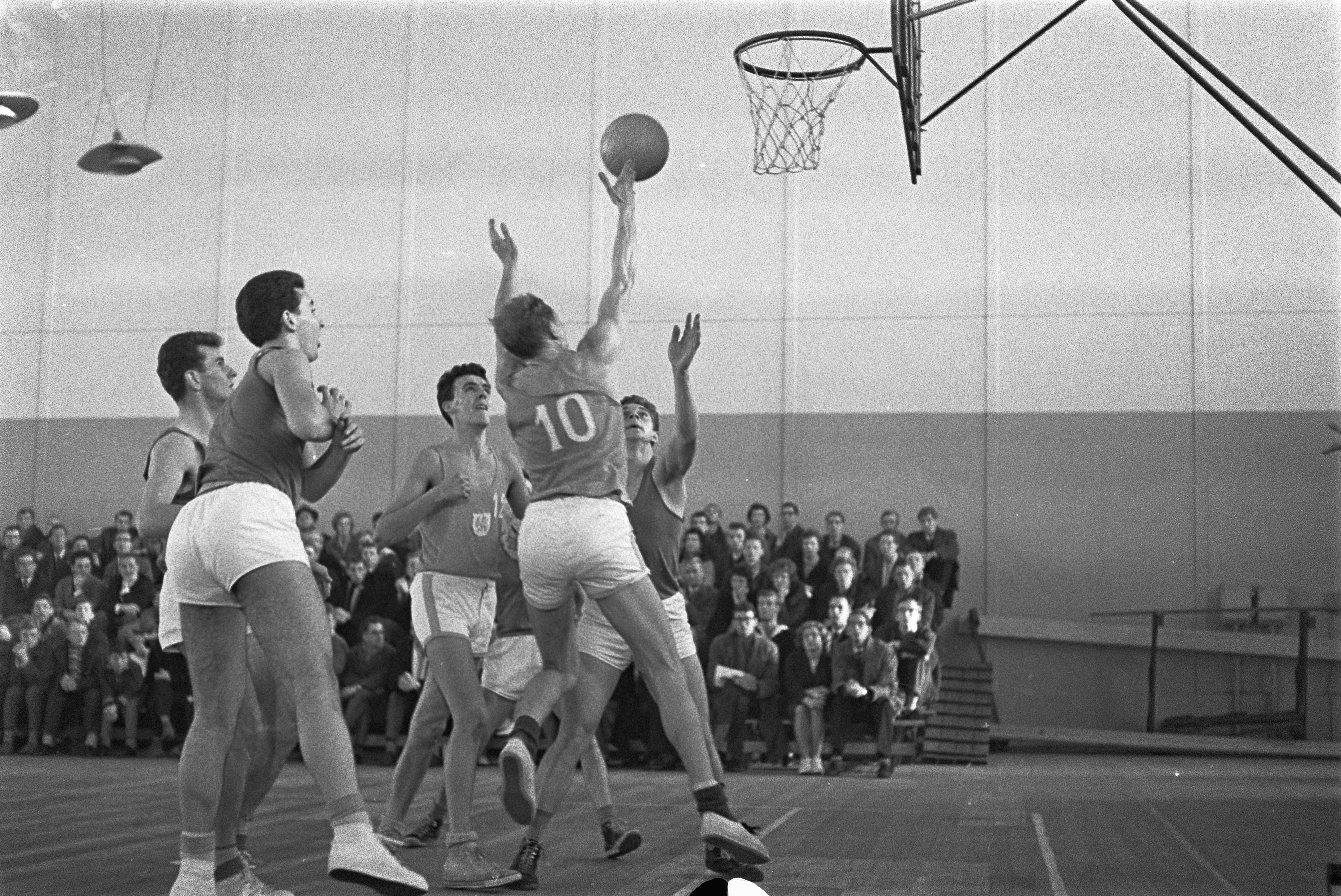 Collectie / Archief : Fotocollectie Anefo Reportage / Serie : [ onbekend ] Beschrijving : Basketbal Nederland tegen Luxemburg in Apollohal Amsterdam Datum : 29 november 1959 Locatie : Amsterdam, Noord-Holland Trefwoorden : BASKETBAL Instellingsnaam : Apollohal Fotograaf : Pot, Harry / Anefo Auteursrechthebbende : Nationaal Archief Materiaalsoort : Negatief (zwart/wit) Nummer archiefinventaris : bekijk toegang 2.24.01.05 Bestanddeelnummer : 910-8505